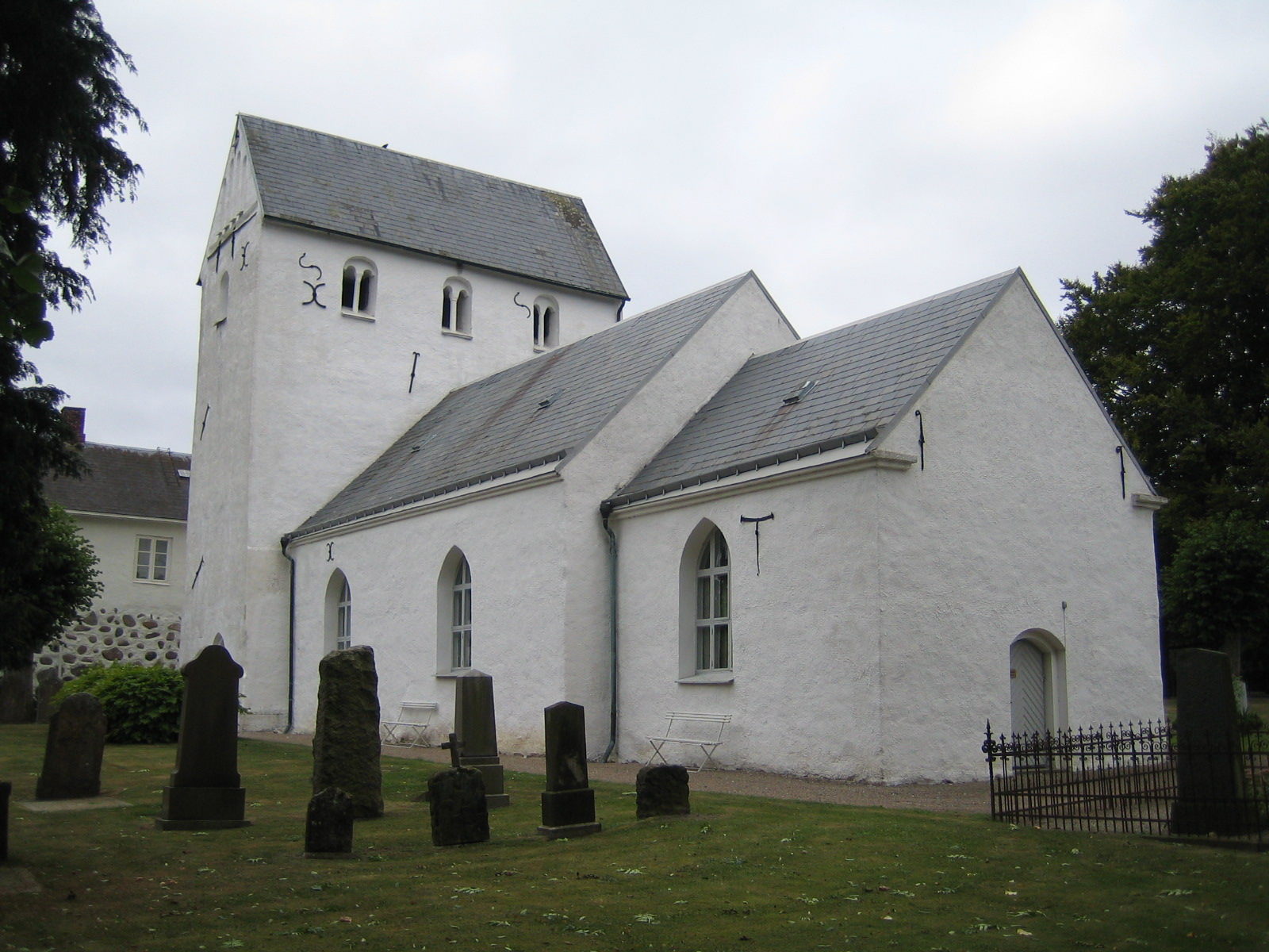 Stora Herrestads kyrka